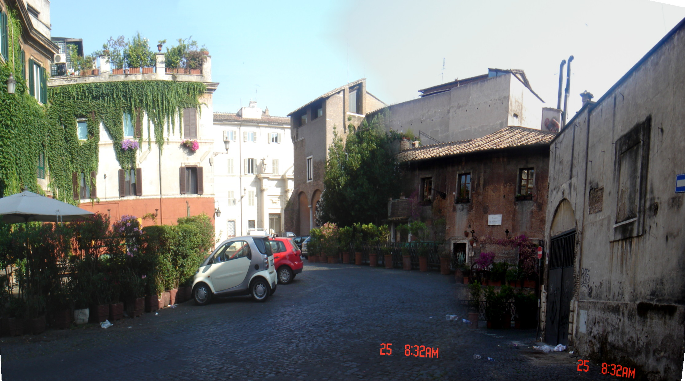 Roma Trastevere: piazza dei Mercanti a Santa Cecilia